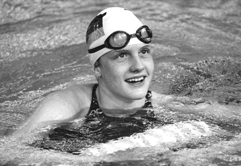 Kristin Otto ADN-ZB Kluge 4.8.82 Guayaquil-Ekuador: 4. Weltmeisterschaften im Sportschwimmen- Glückstrahlende Doppelweltmeisterin. Die 16jährige Kristin Otto (SC DHfK Leipzig- Foto von den DDR-Meisterschaften 1982 in Erfur) erkämpfte am dritten Wettkampftag gleich zwei Goldmedaillen. Im 100-m-Rückenschwimmen siegte sie in 1:01,30 min und danach war die mit der 4 x 100m -Freistilstaffel erneut erfolgreich. Abgebildete Personen: Otto, Kristin: Schwimmerin, Olympiateilnehmerin 1988, DDR